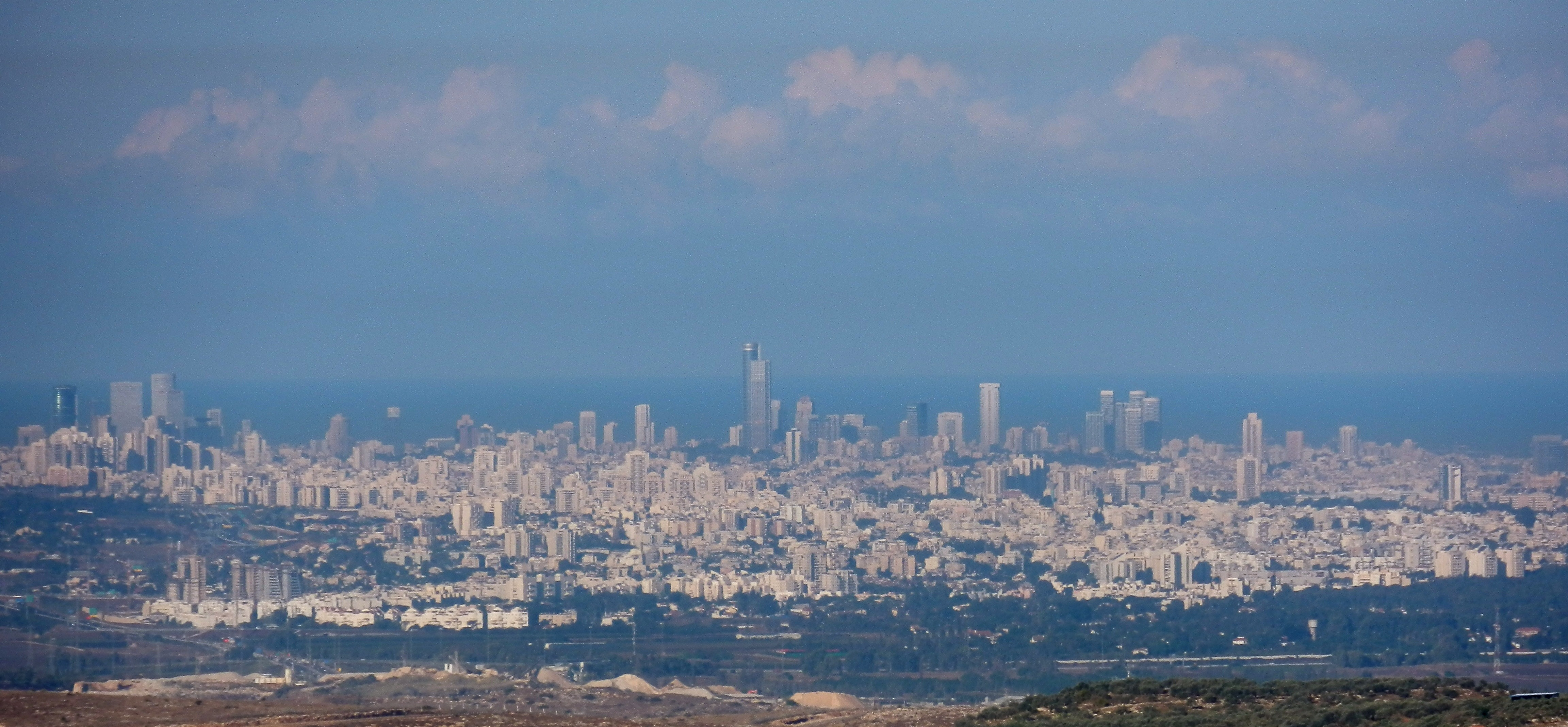 העיר תל-אביב והים התיכון כפי שנצפו מהמרפסת של המדינה ביום של ראות טובה